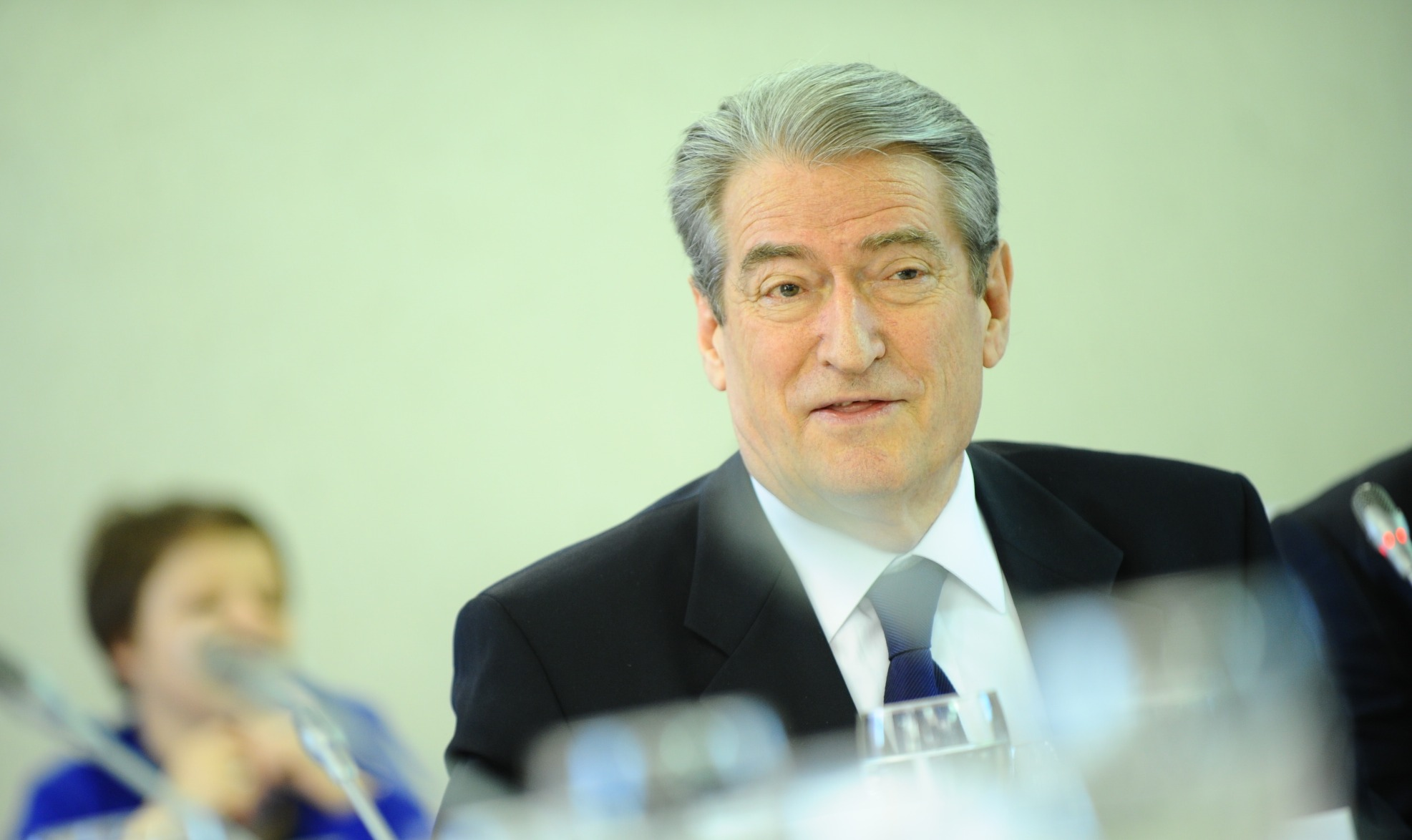 Sali Berisha